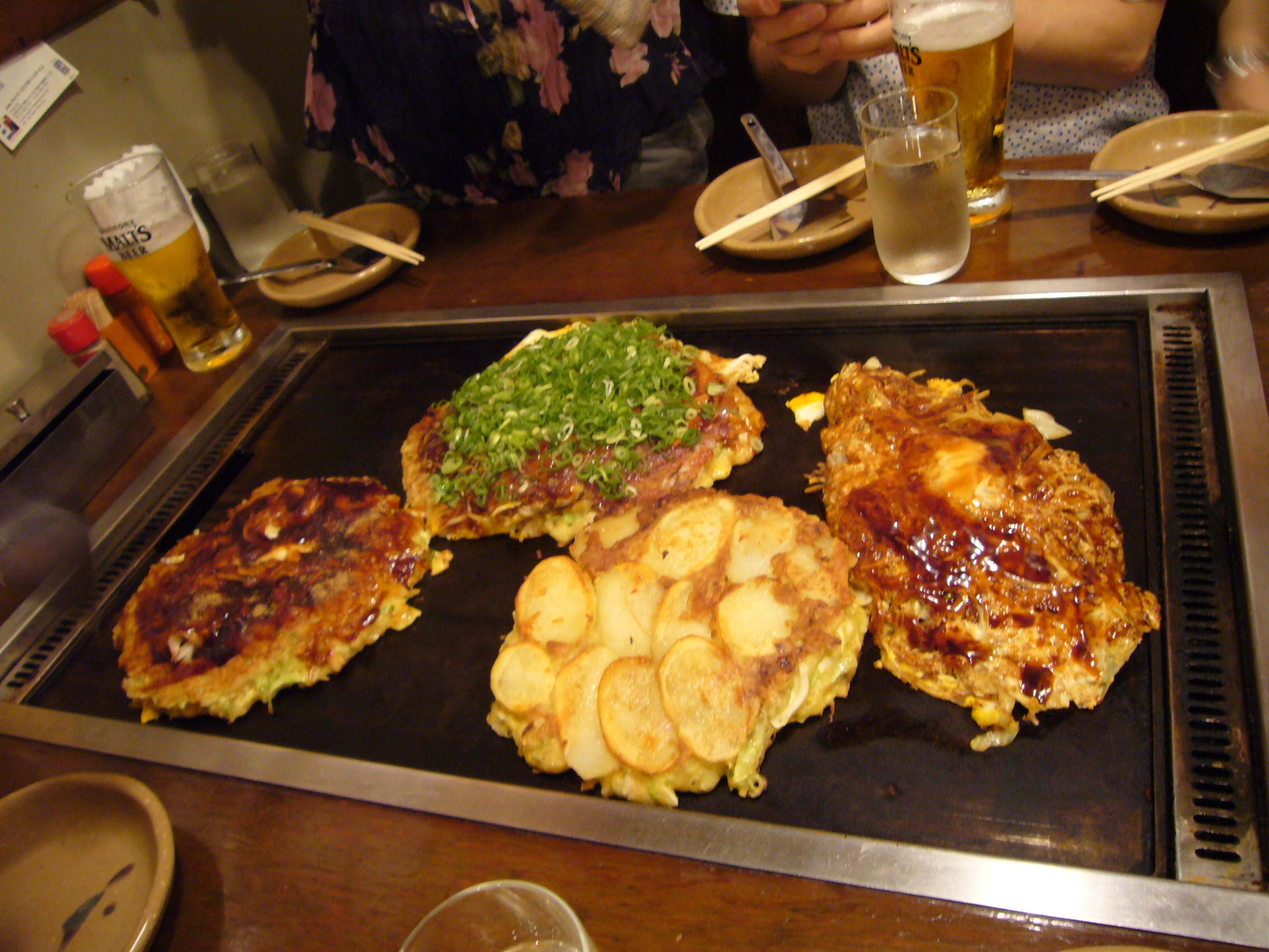 ちょううまかったおこのみやき@きじ